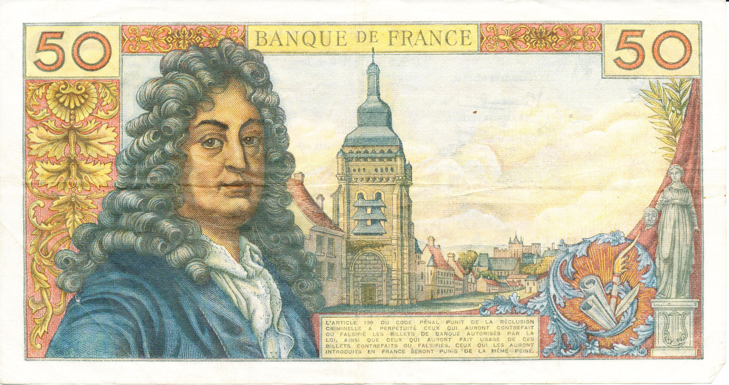 verso d'un billet de 50 francs de 1967